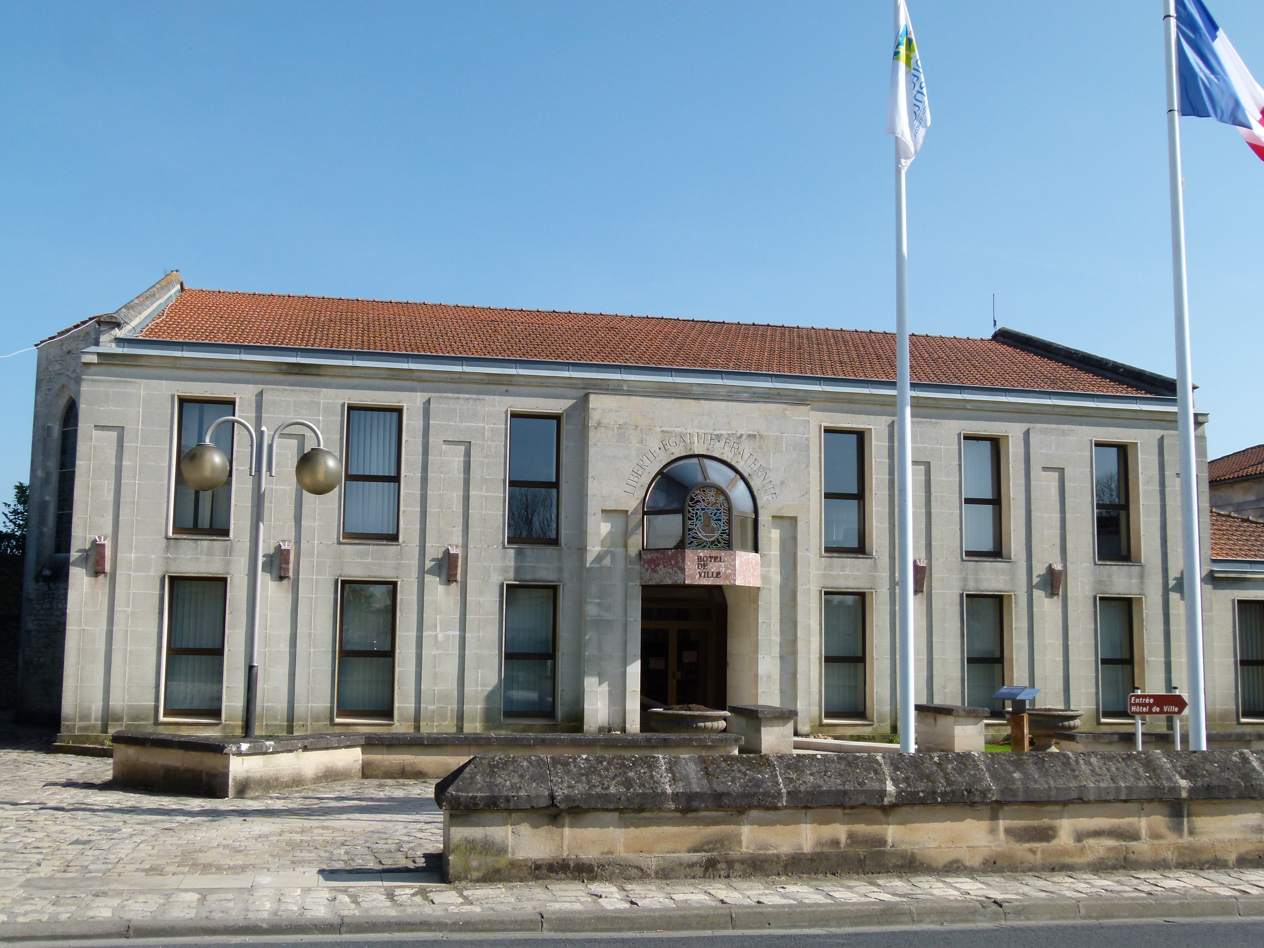 L'Hôtel de ville de Marennes (17)